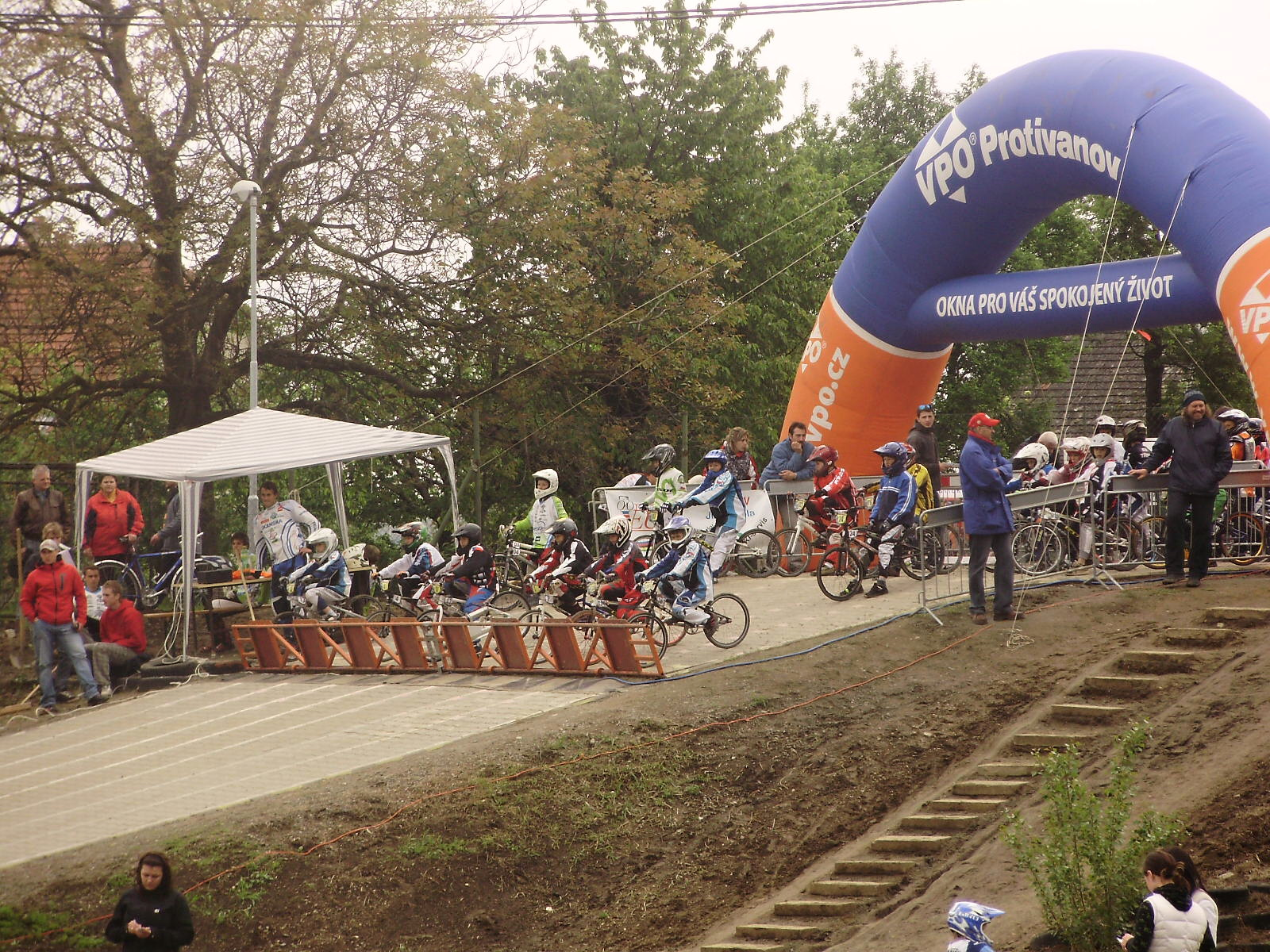 Vyškov BMX Opening